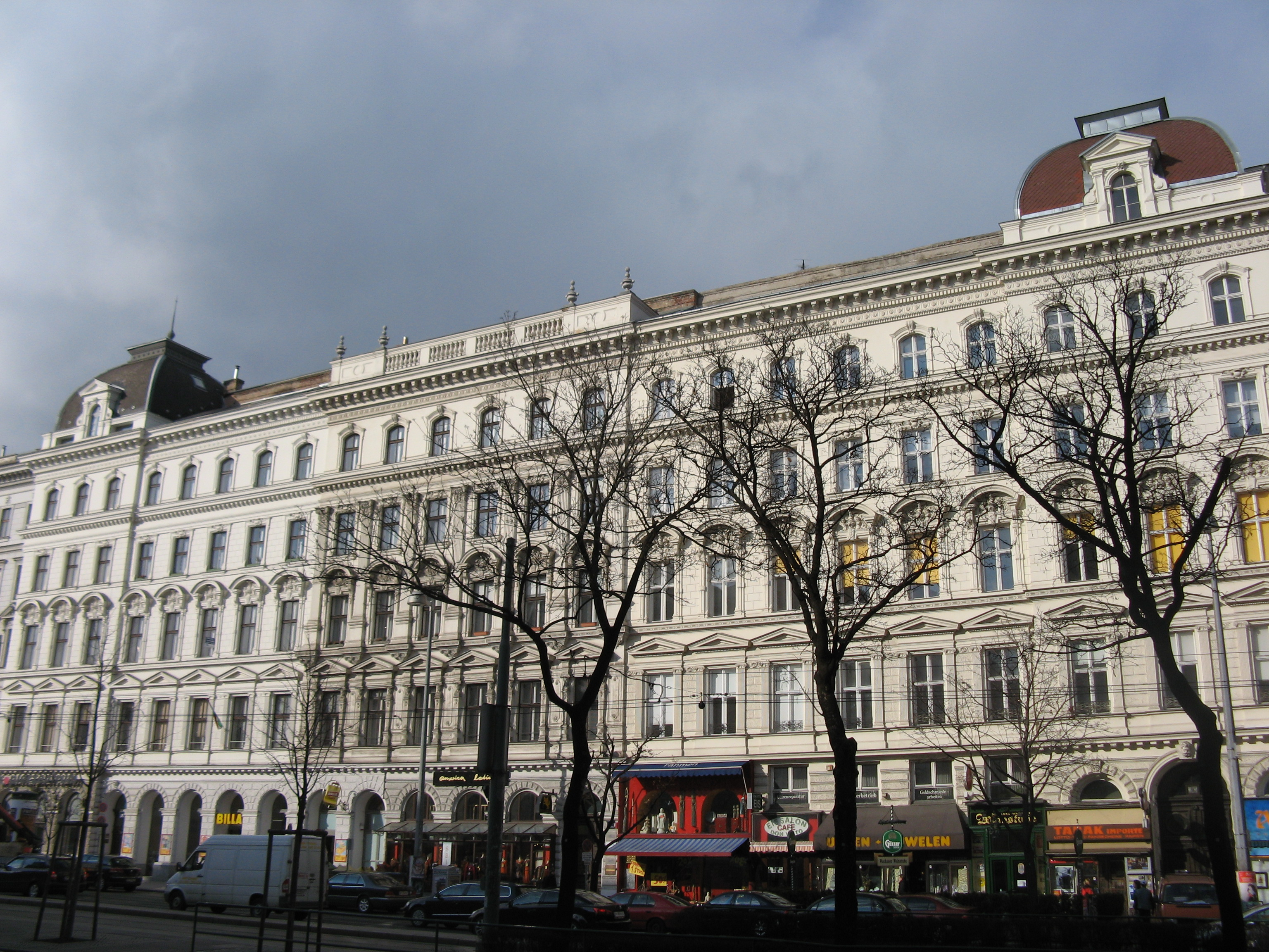 Wohn- und Geschäftshaus (1880-81) von Ludwig Tischler, Universitätsstraße 4-8, Wien-Alsergrund